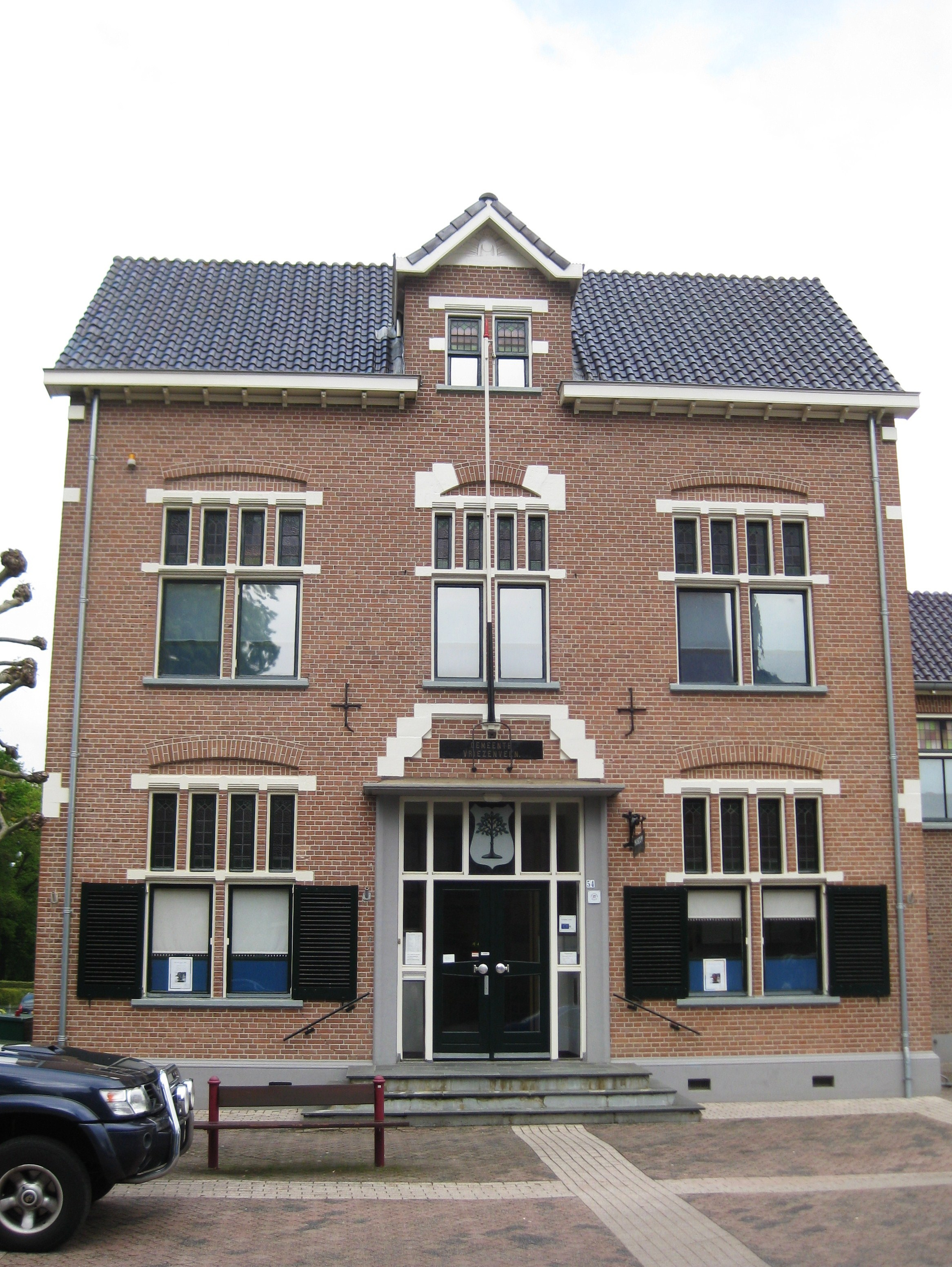 Historisch Museum in Vriezenveen, Overijssel